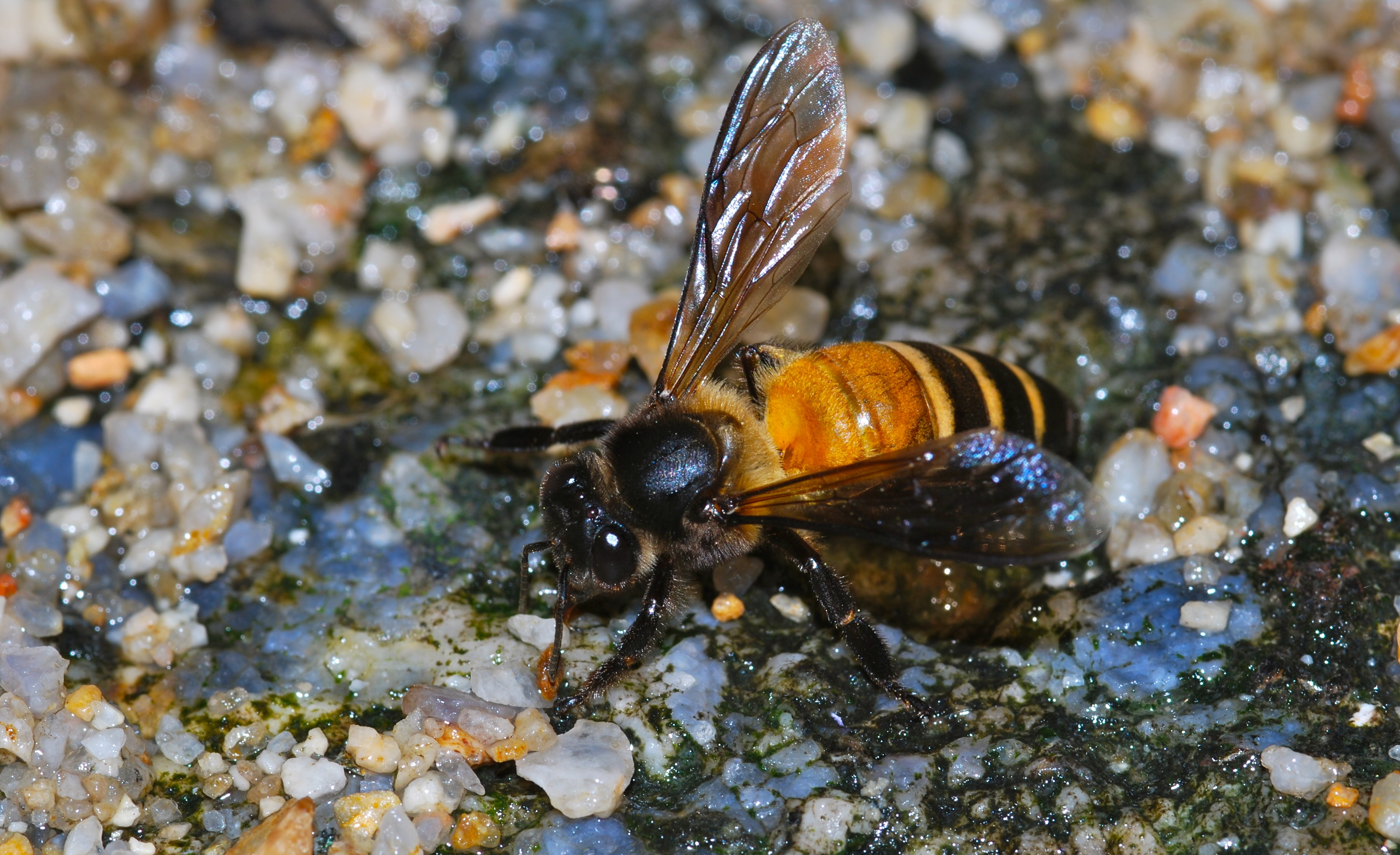 Tapah Hills, Perak, MALAYSIA